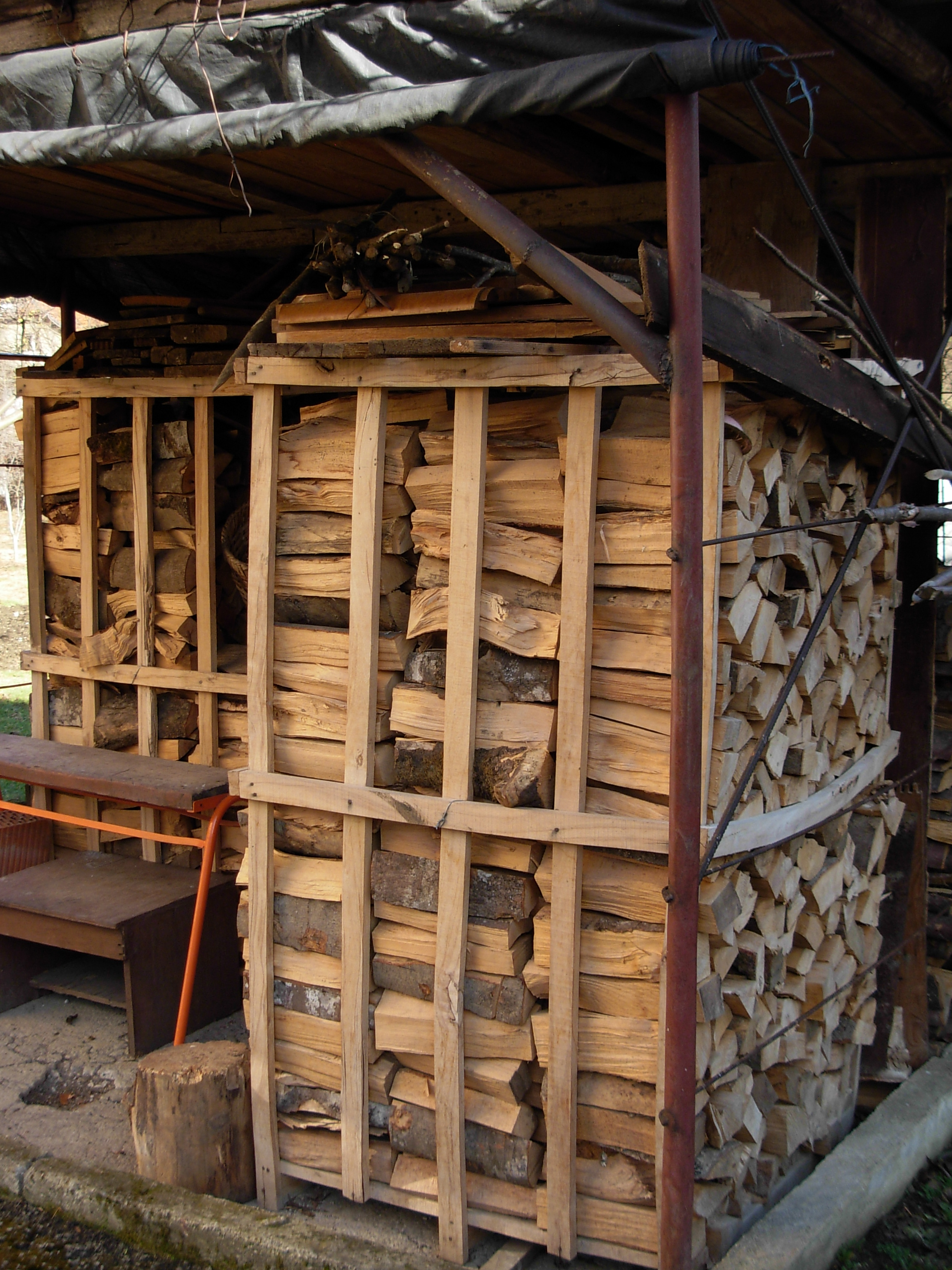 Iscijepana i složena bukova drva u Mrkonjić Gradu.